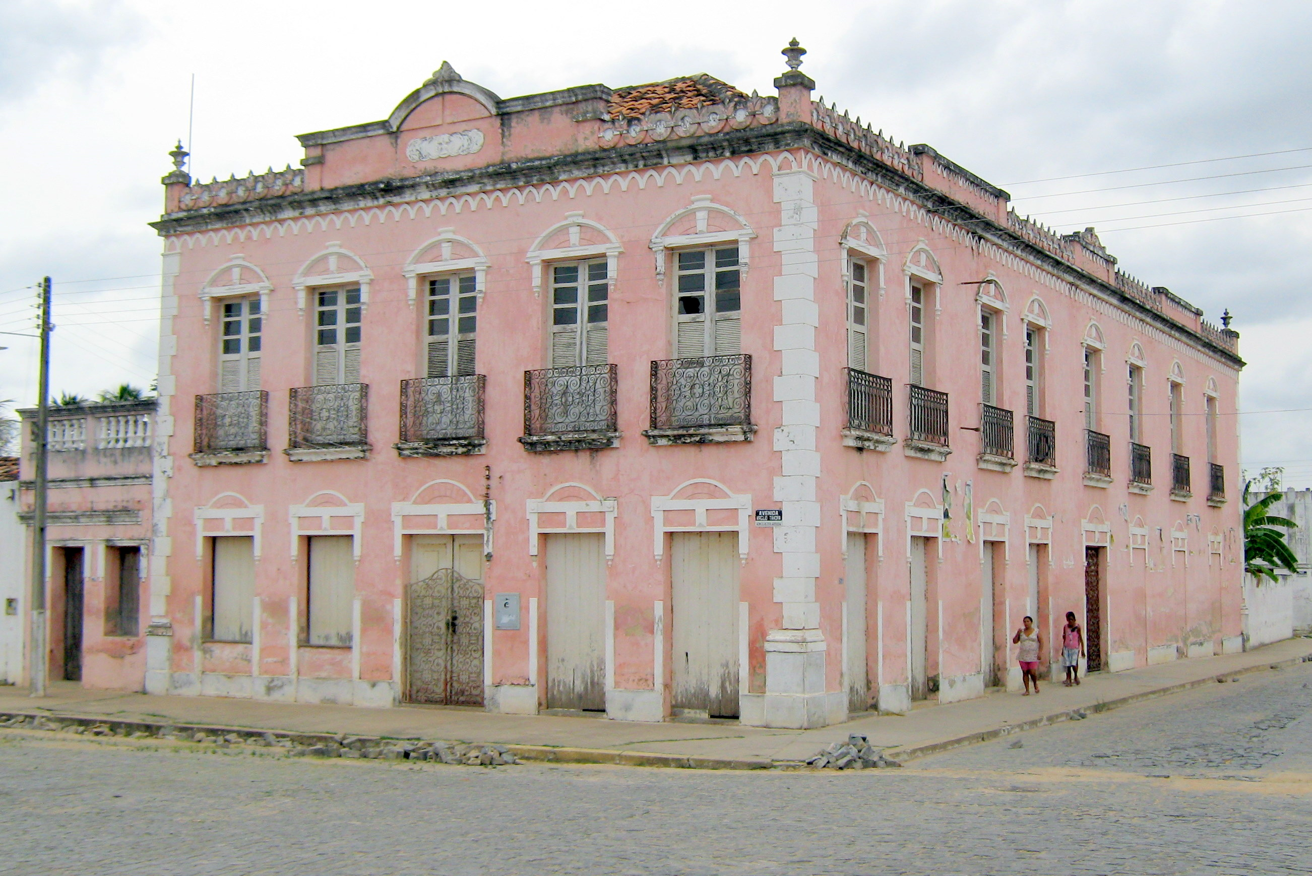 Solar dos Gouveia